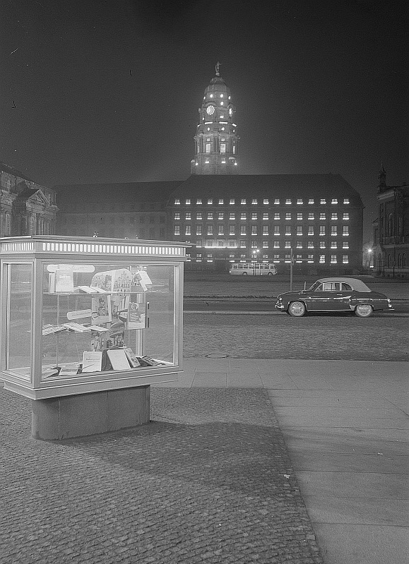 Original image description from the Deutsche FotothekDresden. Rathaus von der Seestraße aus